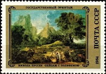 Почтовая марка СССР. Никола Пуссен. «Пейзаж с Полифемом». Номер в каталоге ЦФА 5577